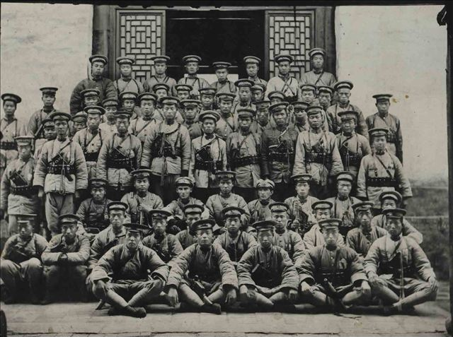 モーゼルC96で武装した張宗昌軍の兵士ら。